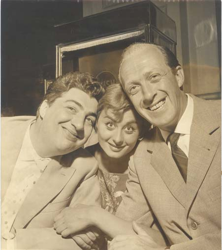 Gino Bramieri, Sandra Mondaini e Raimondo Vianello, foto del 1958, Farabola Fonte: Licensing Categoria:Immagini di attori italiani